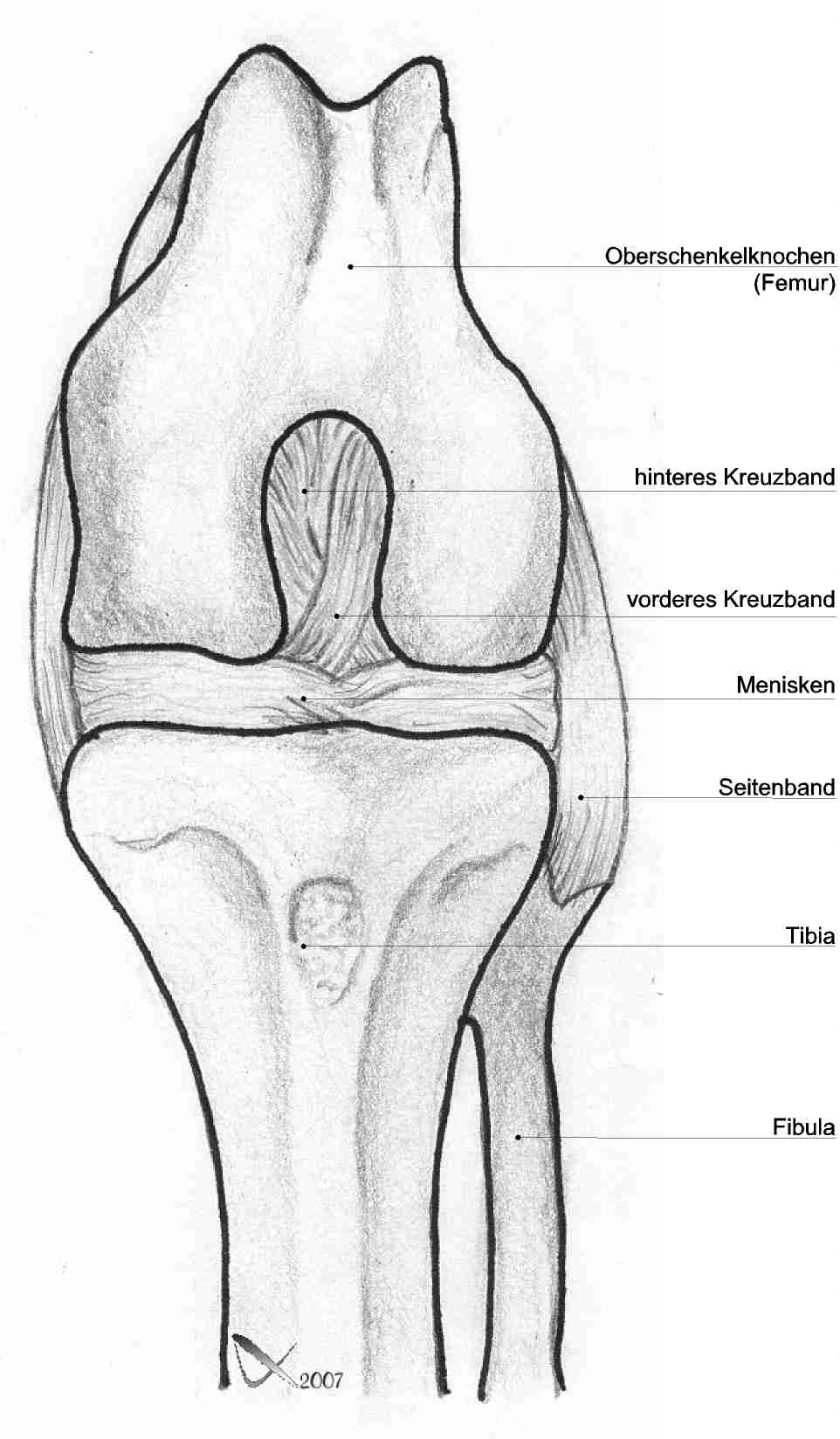 dog knee